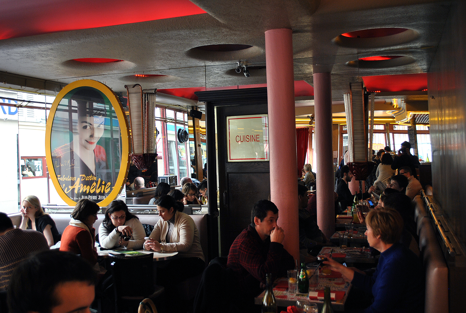 El Café de Los Dos Molinos (Café des 2 Moulins en francés) es un café-brasserie de París. Se hizo famoso en 2001 en la película de Jean-Pierre Jeunet Amélie, porque fue el escenario en el que el personaje principal trabaja como camarera. Su nombre se refiere al Moulin Rouge y al Moulin de la Galette, ambos próximos.